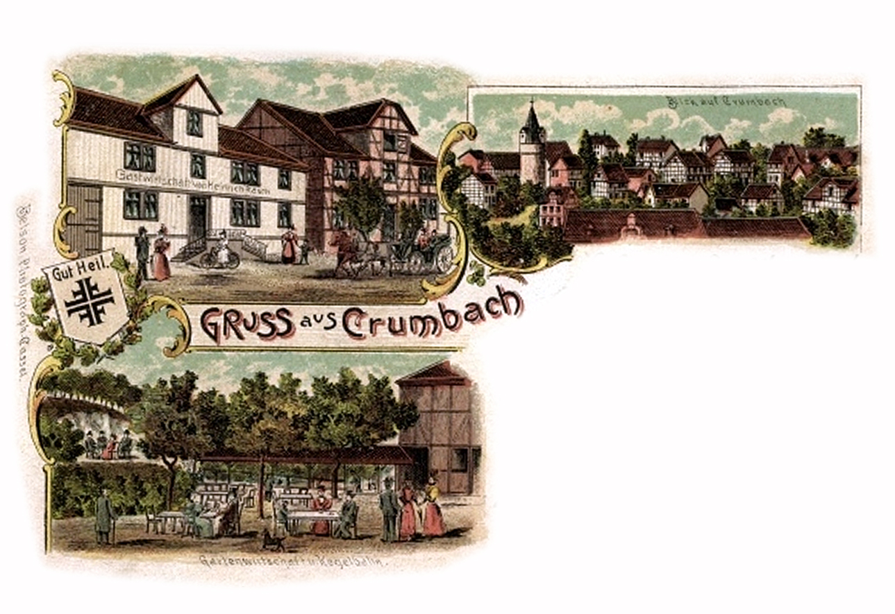 Postkarte um 1900 aus Crumbach bei Kassel. Heute ein Ortsteil von Lohfelden.